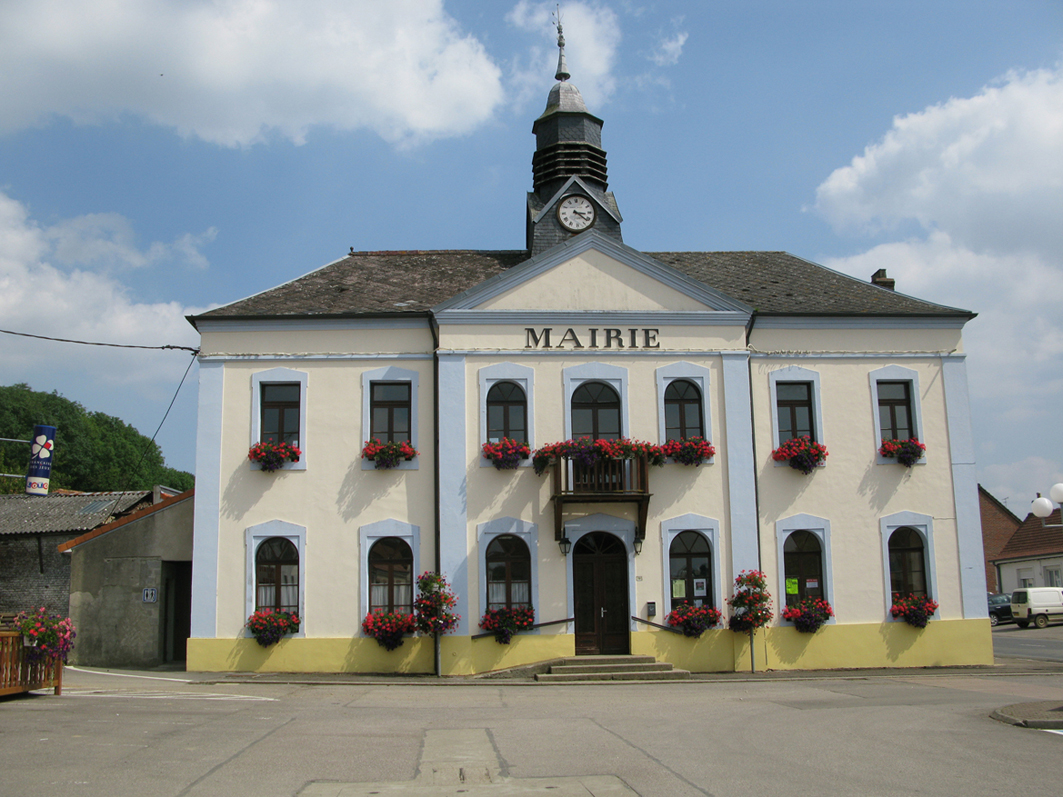 Hucqueliers mairie